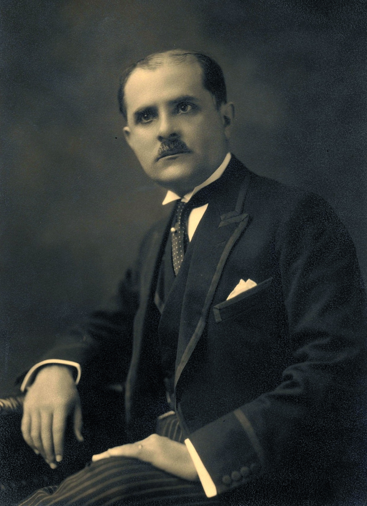 Dr. Luis Antonio Eguiguren hacia el año 1931-1932